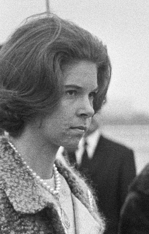 Collectie / Archief : Fotocollectie Anefo Reportage / Serie : [ onbekend ] Beschrijving : Aankomst Grieks Koninklijk paar op Schiphol, v.l.n.r. prins Bernhard , Koning Constantijn , Koningin Anne Marie tijdens spelen volksliederen / Datum : 7 maart 1966 Trefwoorden : VOLKSLIEDEREN, aankomsten Persoonsnaam : Bernhard, prins, Constantijn koning, Koningin Anne Marie Fotograaf : Koch, Eric / Anefo Auteursrechthebbende : Nationaal Archief Materiaalsoort : Negatief (zwart/wit) Nummer archiefinventaris : bekijk toegang 2.24.01.05 Bestanddeelnummer : 918-8594